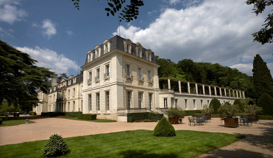 Chateau de rochecotte